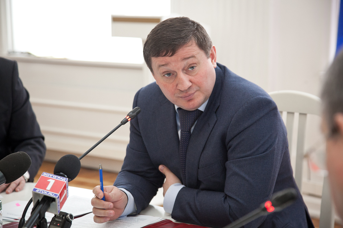 Андрей Бочаров